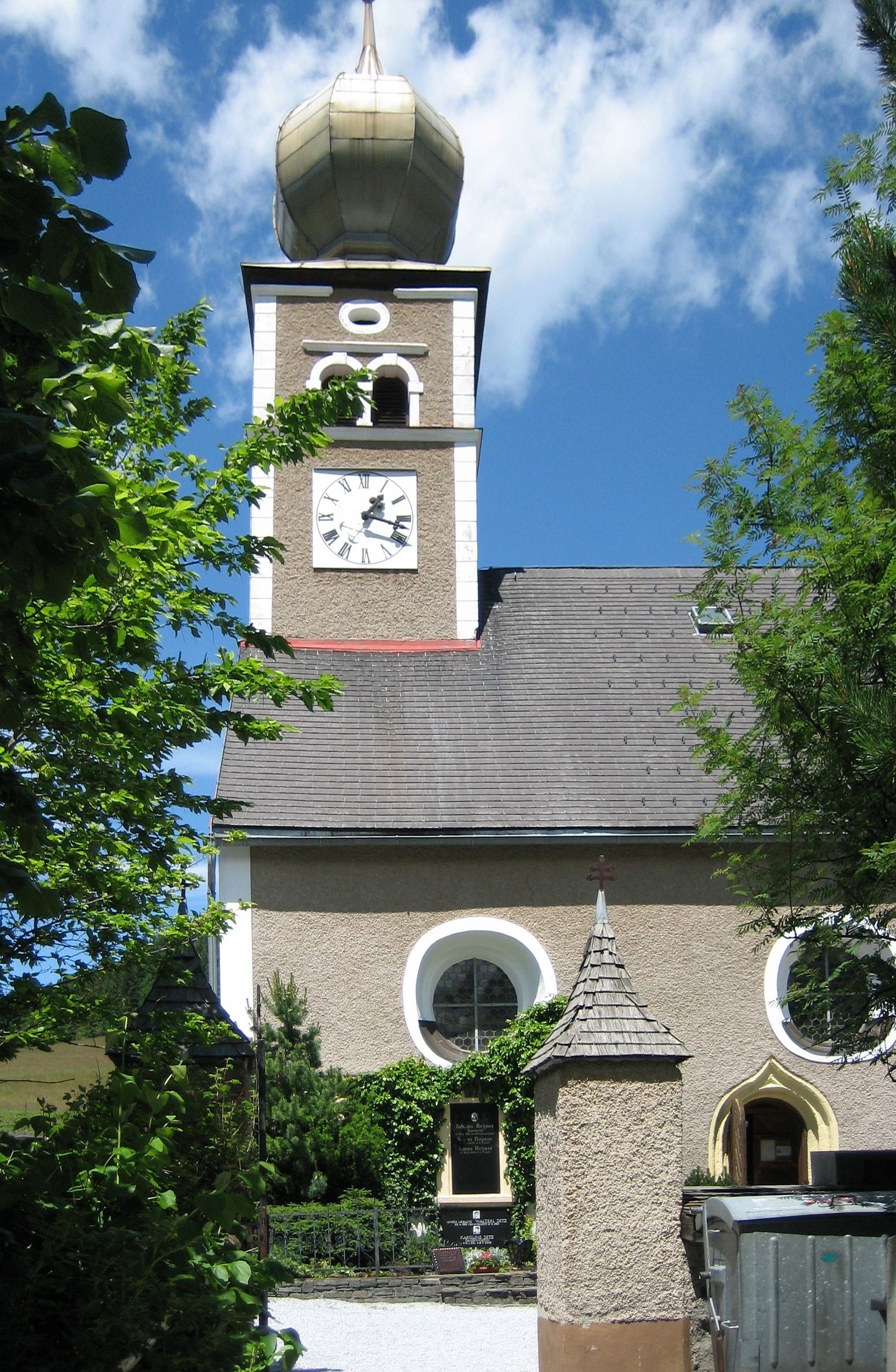 Das bild zeigt die Kath. Pfarrkirche St. Bartholomä in der österreichischen Gemeinde Hohentauern (Steiermark)